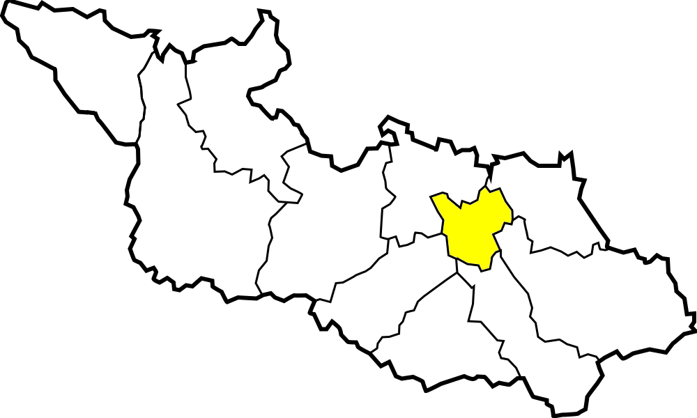 Diecezja ostrawsko-opawska - dekanat Ostrawa